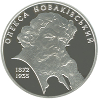 Срібна монета Олекса Новаківський реверс